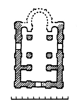 Барысаглебская царква. Полацк